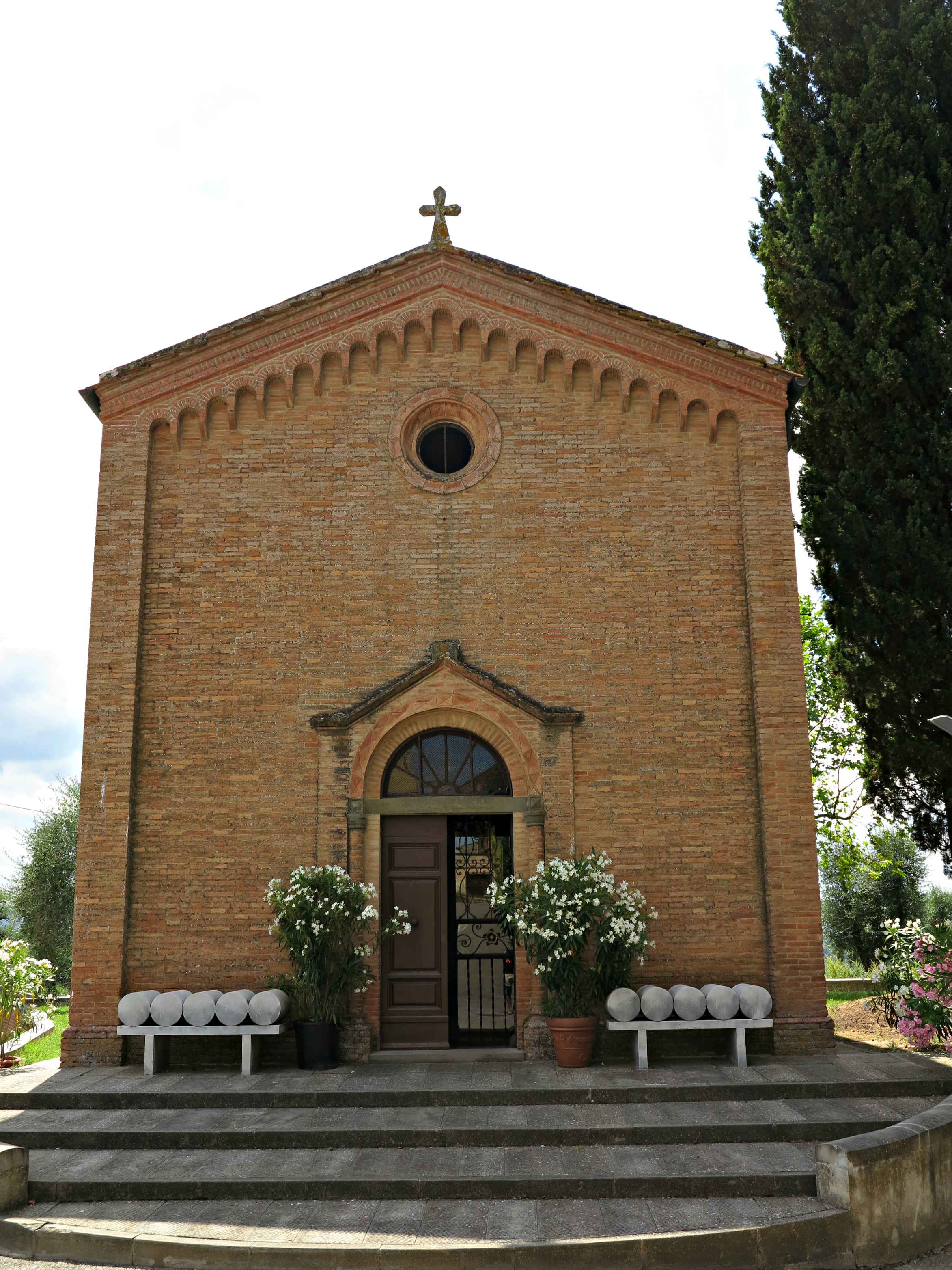 Facciata dell'Oratorio della Santissima Annunziata, Ghizzano